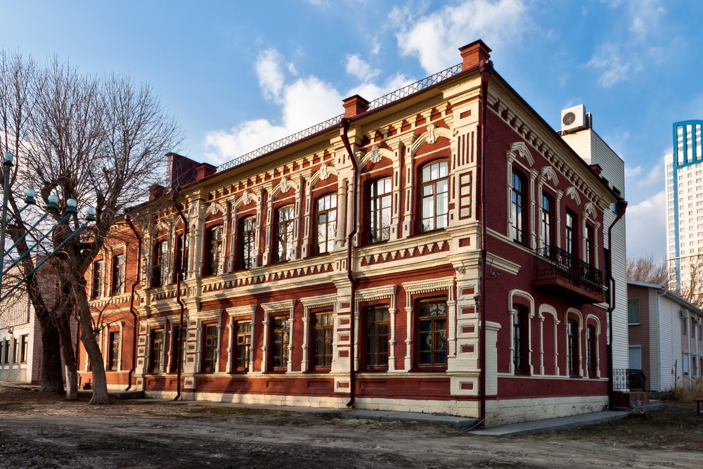 Первая Царицынская синагога (Бейт Давид). Ул. Балахинская д. 2